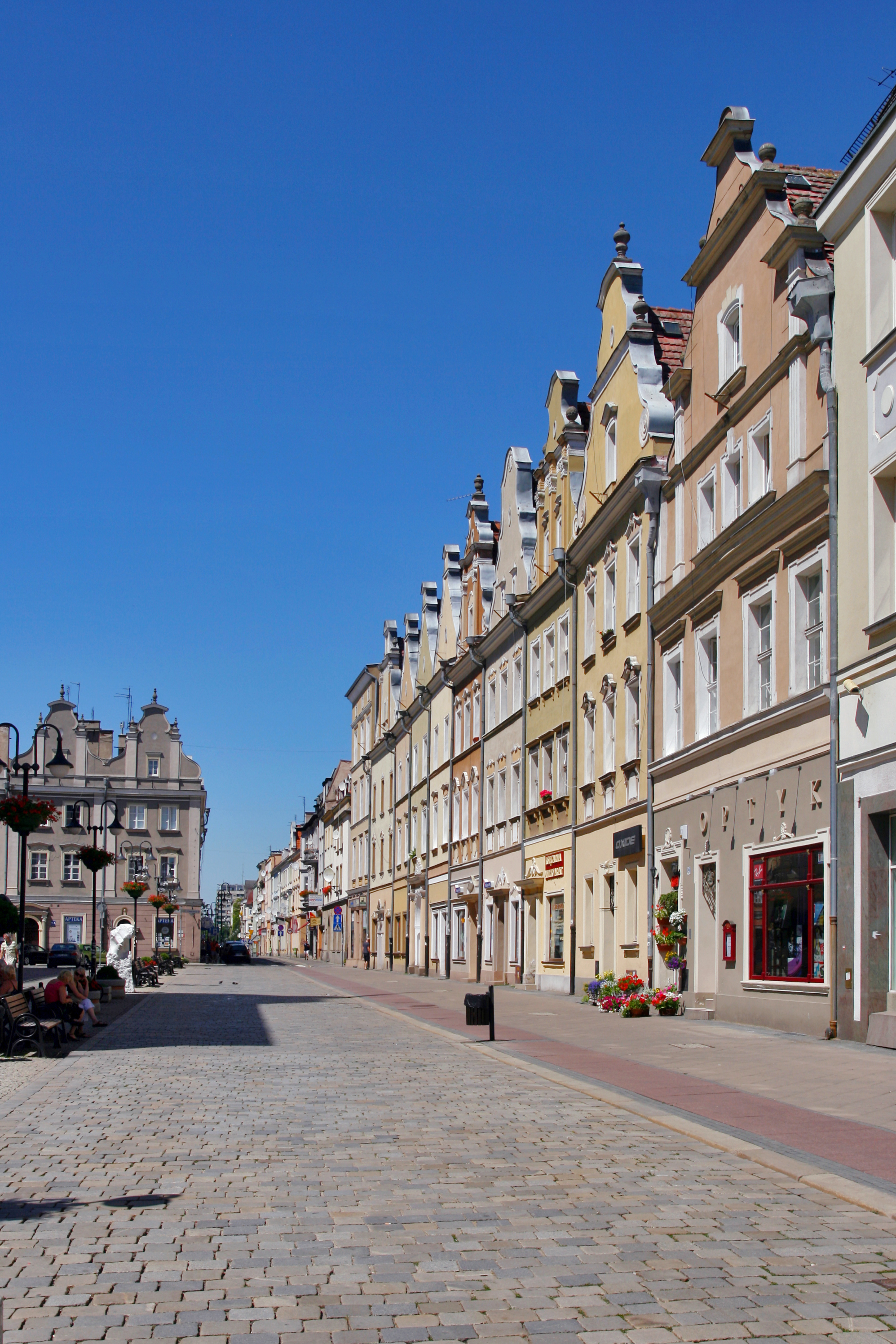 Rynek w Opolu.